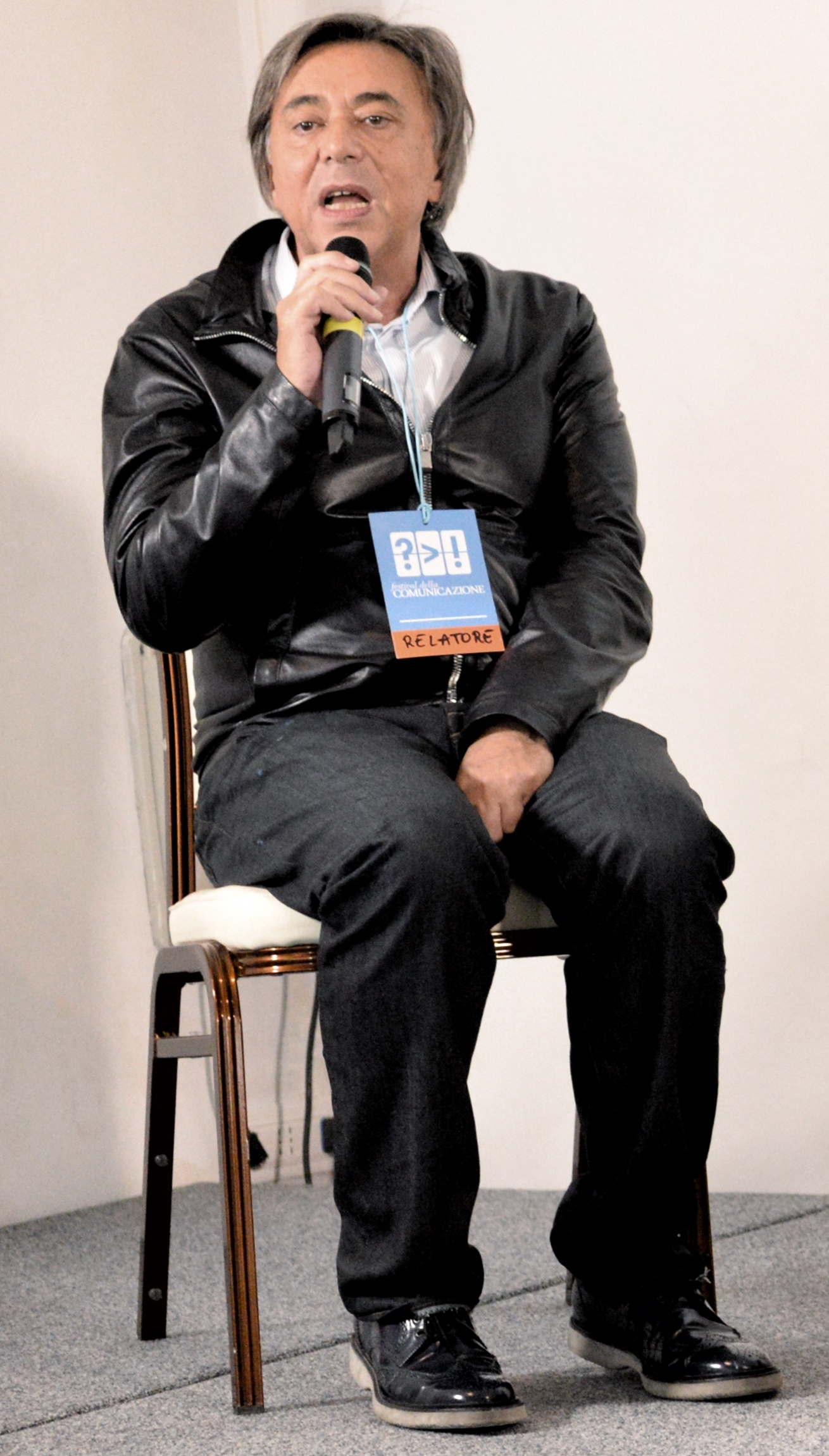 Carlo Freccero, Pierluigi Pardo e David Parenzo al FestivalCom